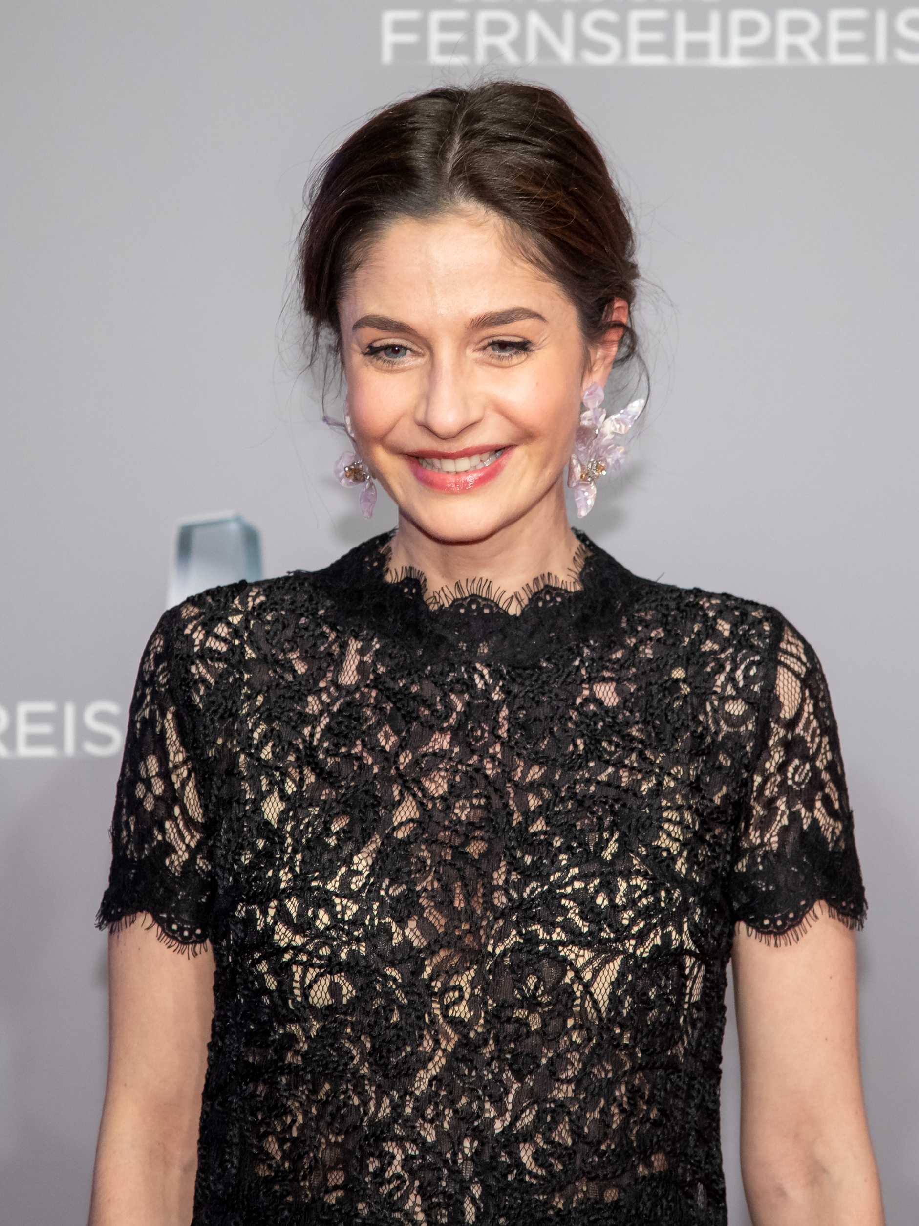 Anne Werner beim Deutschen Fernsehpreis 2019 in der Düsseldorfer Rheinterrasse